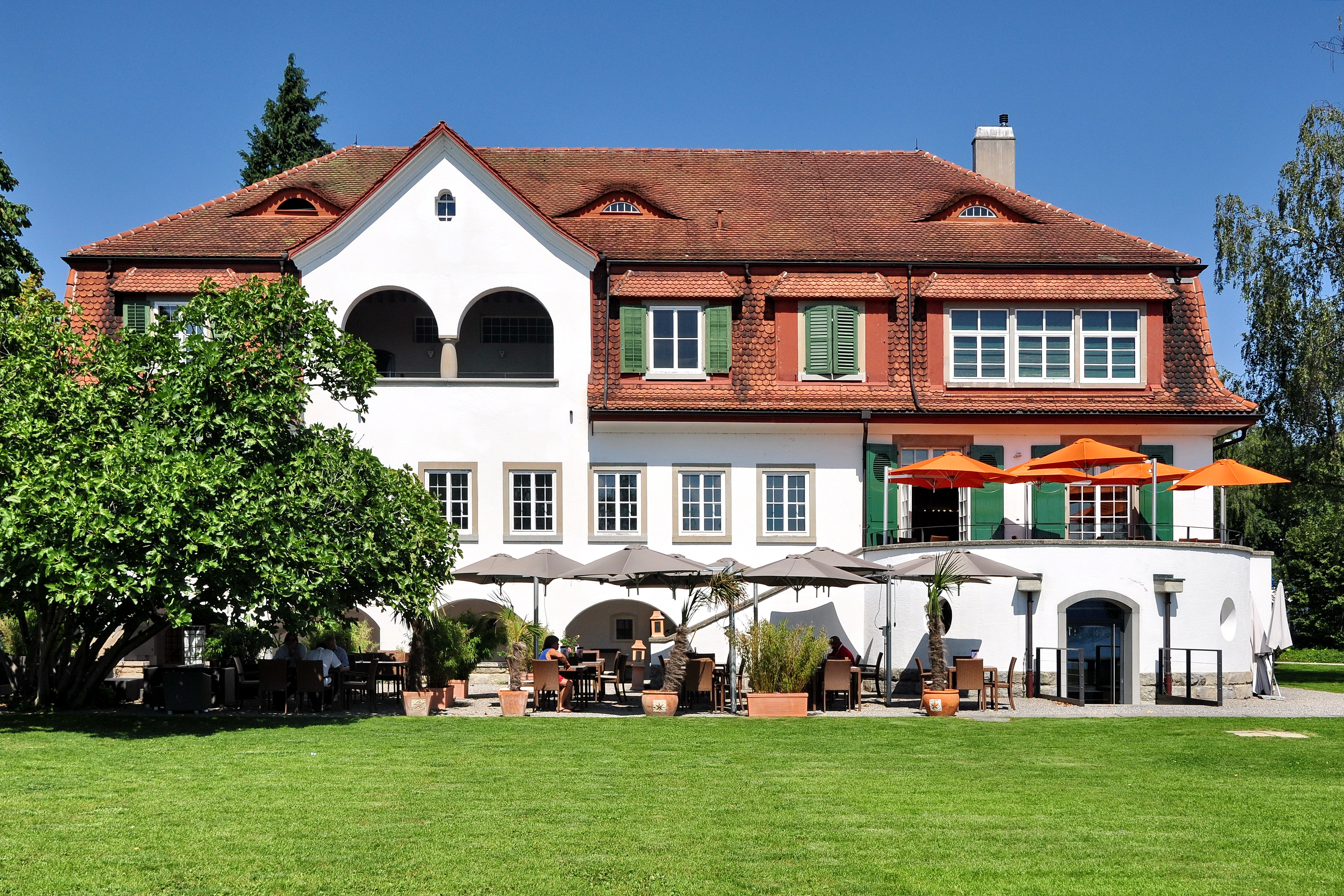 Villa (im) Sunneschy, Seestrasse 156 in Kehlhof-Stäfa (Switzerland)